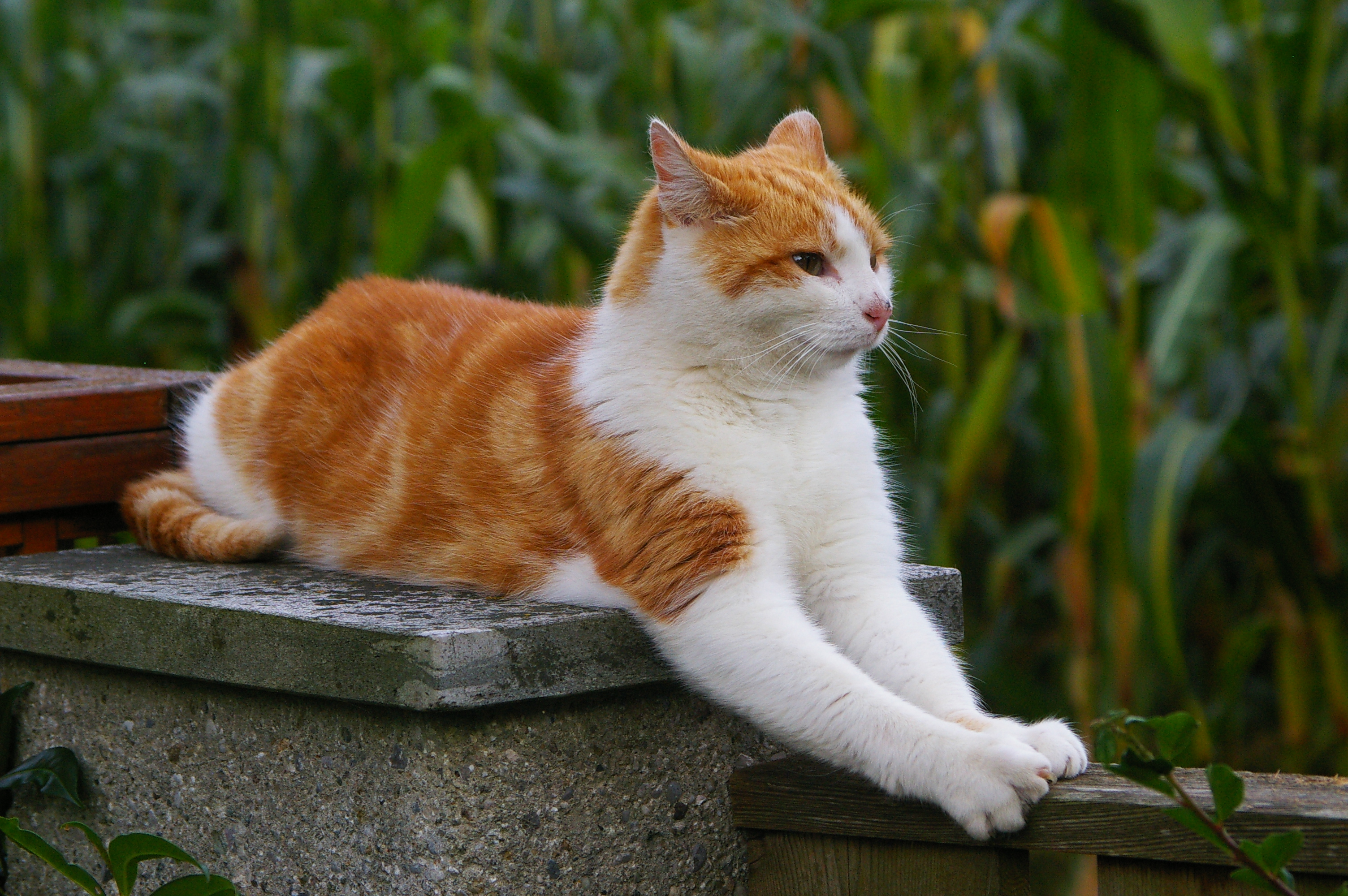 Unsere Katze Muddy bewacht das Haus